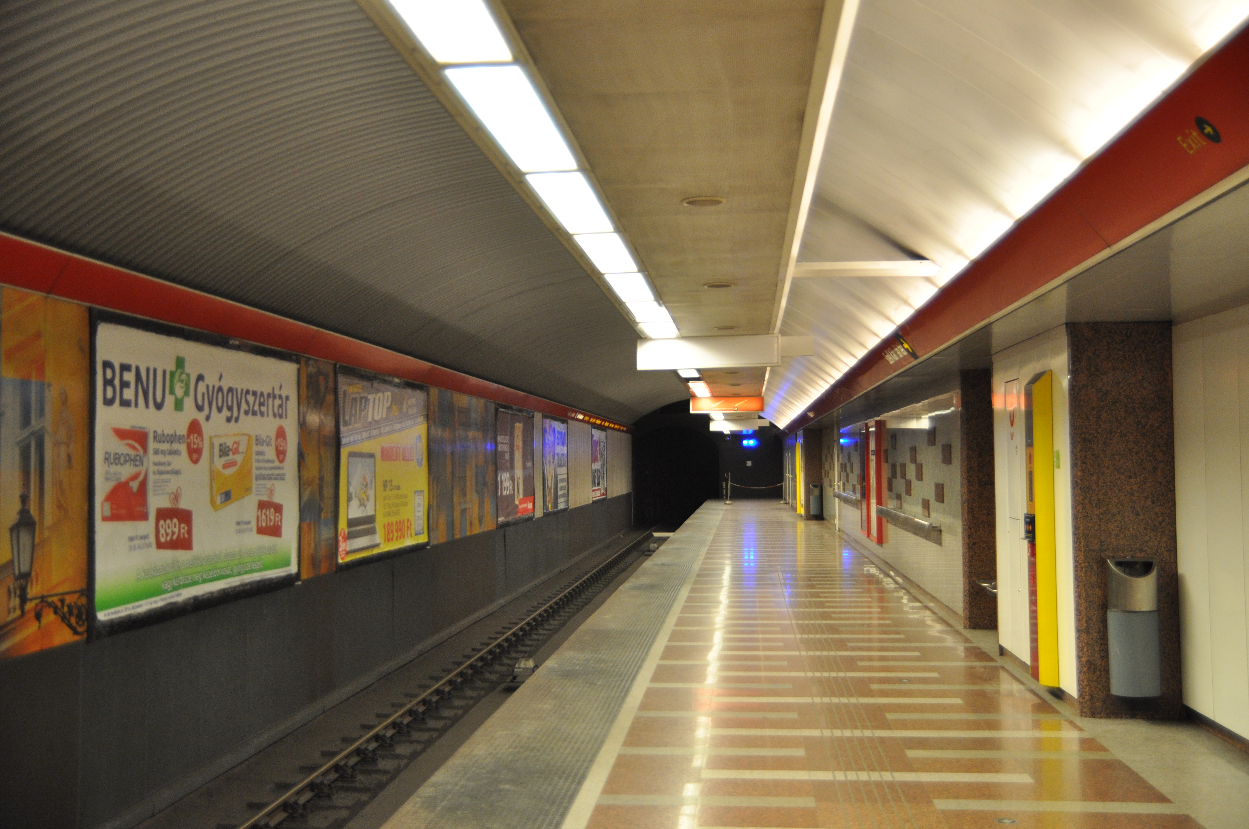 Budapest, metró 2, Széll Kálmán tér